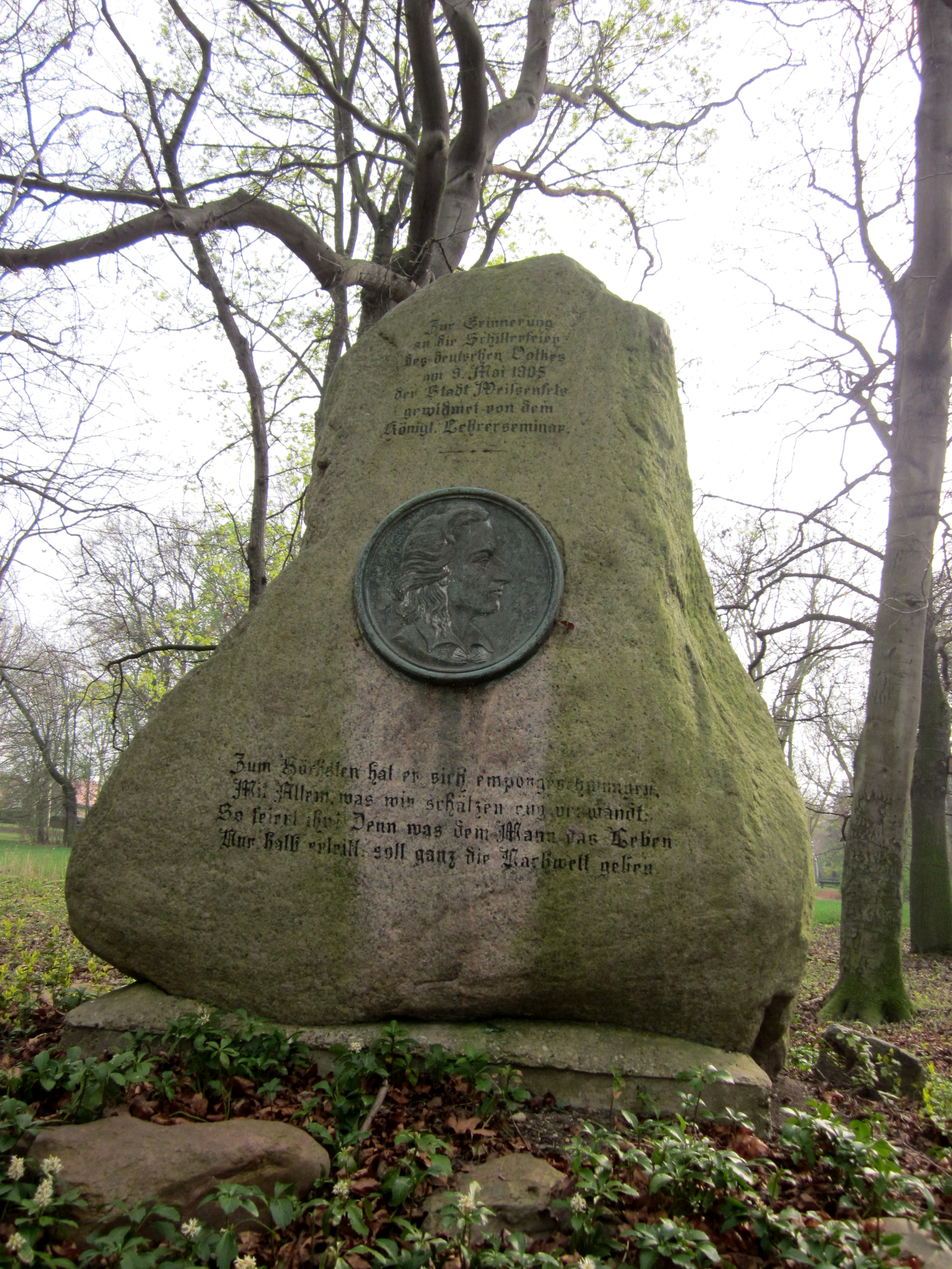 Schiller-Gedenkstein im Klemmbergpark in Weißenfels, anlässlich des 100. Todestages im Jahr 1905 durch das "Königliche Lehrerseminar Weißenfels" gestiftet